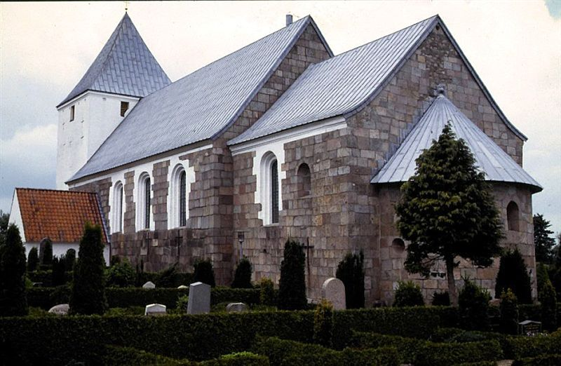 Kirken set fra sydøst Hvirring kirke ligger i Hvirring Sogn, i det tidligere Nim Herred Skanderborg Amt, nuværende Hedensted Kommune, Region Midtjylland. .